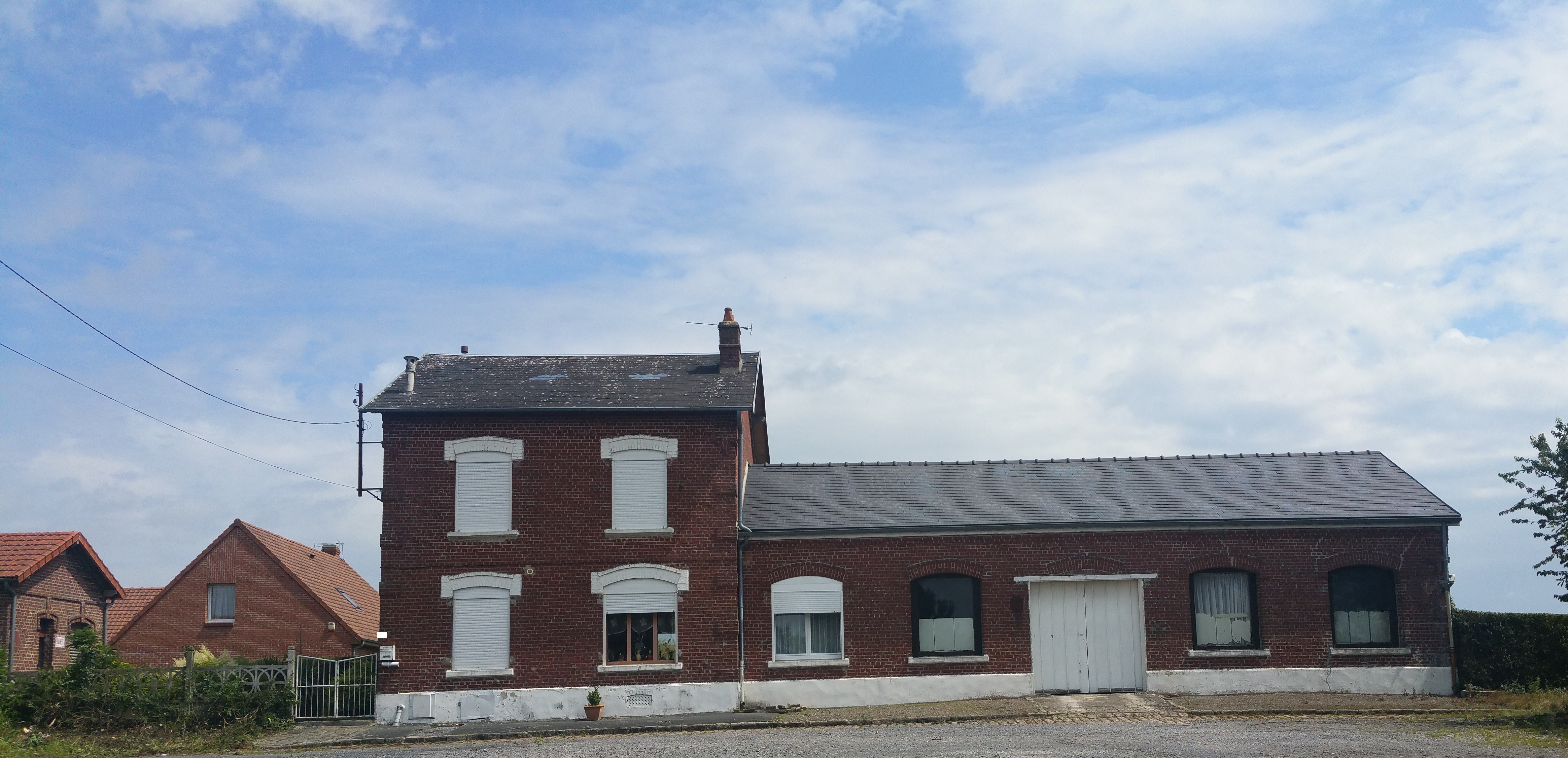 Vue de l'ancienne gare de Neuvilly.